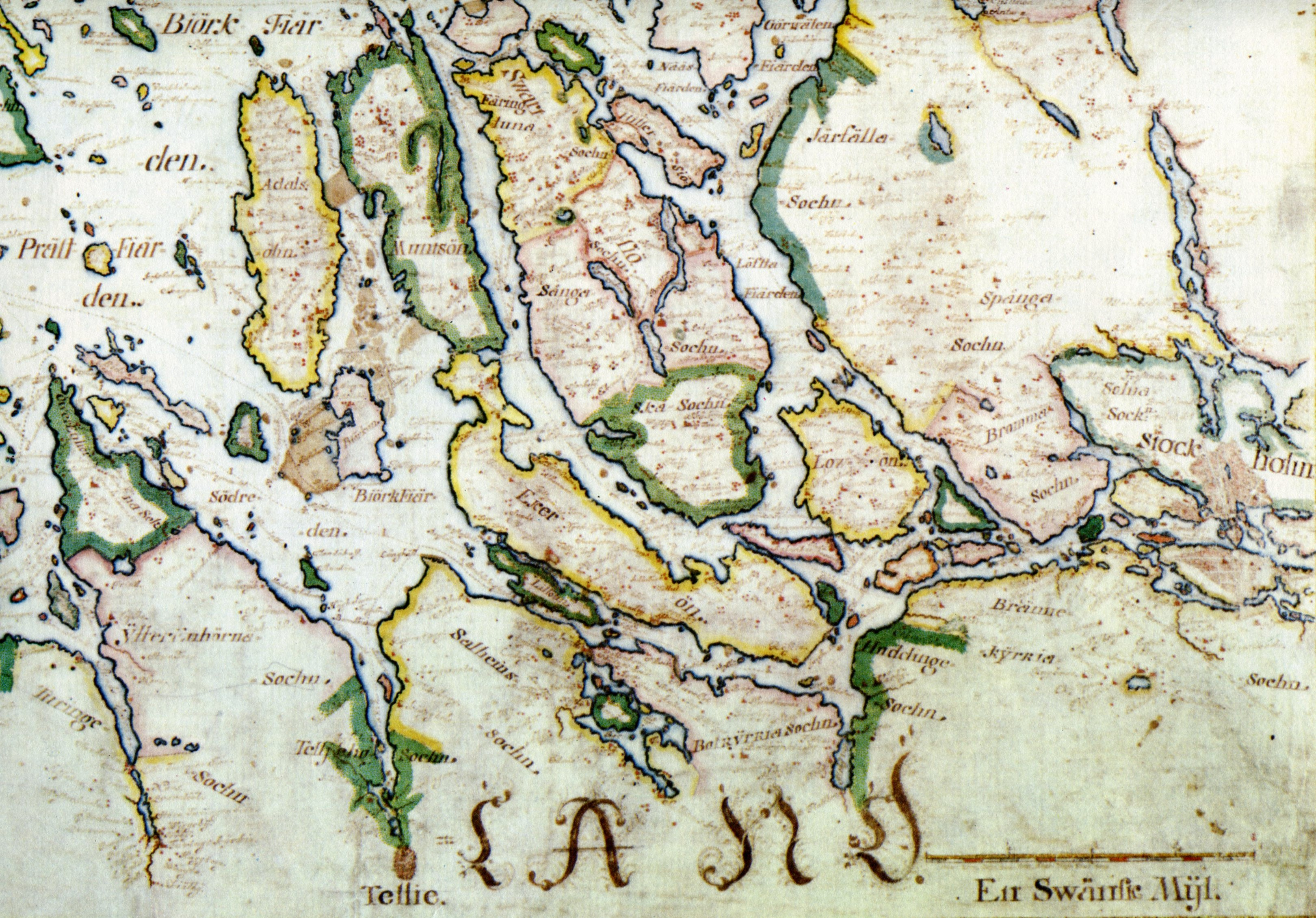 Del av Gripenhielms Mälarkarta från 1689 visande Stockholm och Östra Mälaren (mindre kopia från 1690)